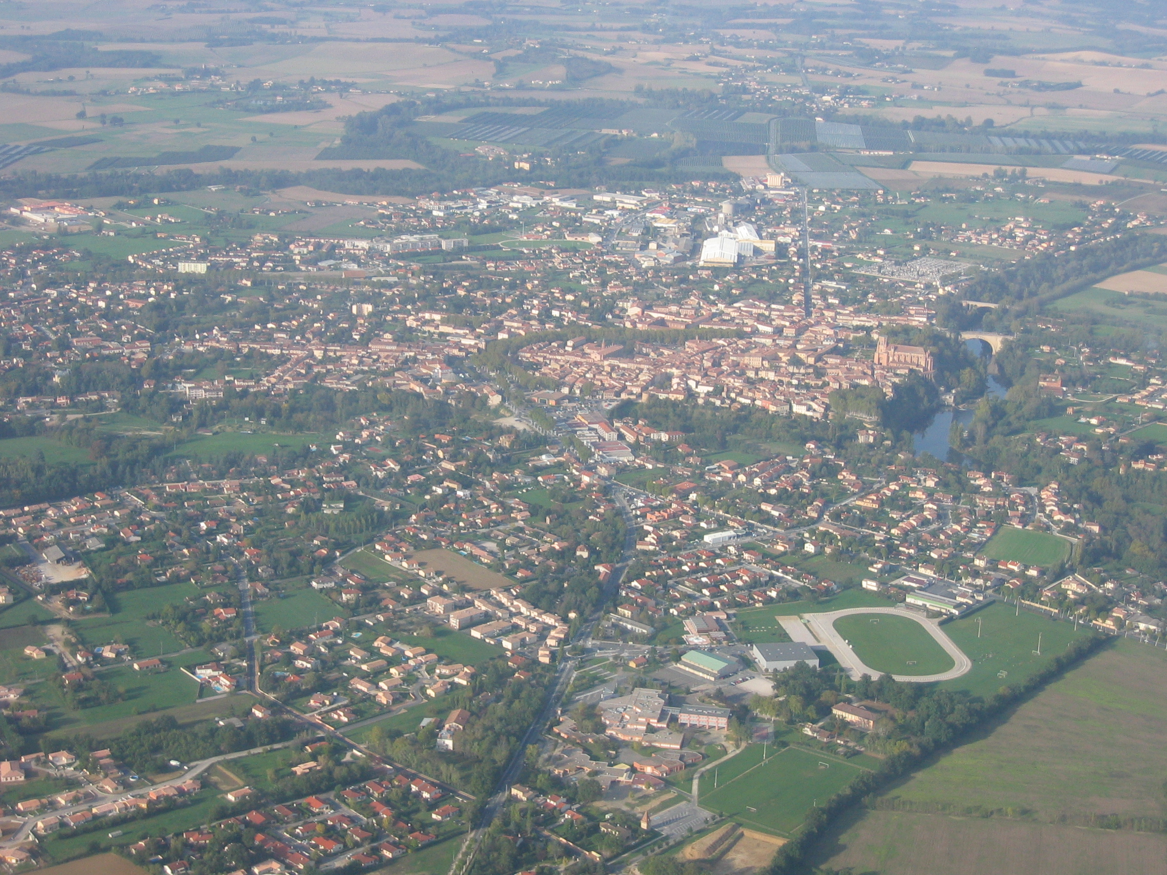 Lavaur